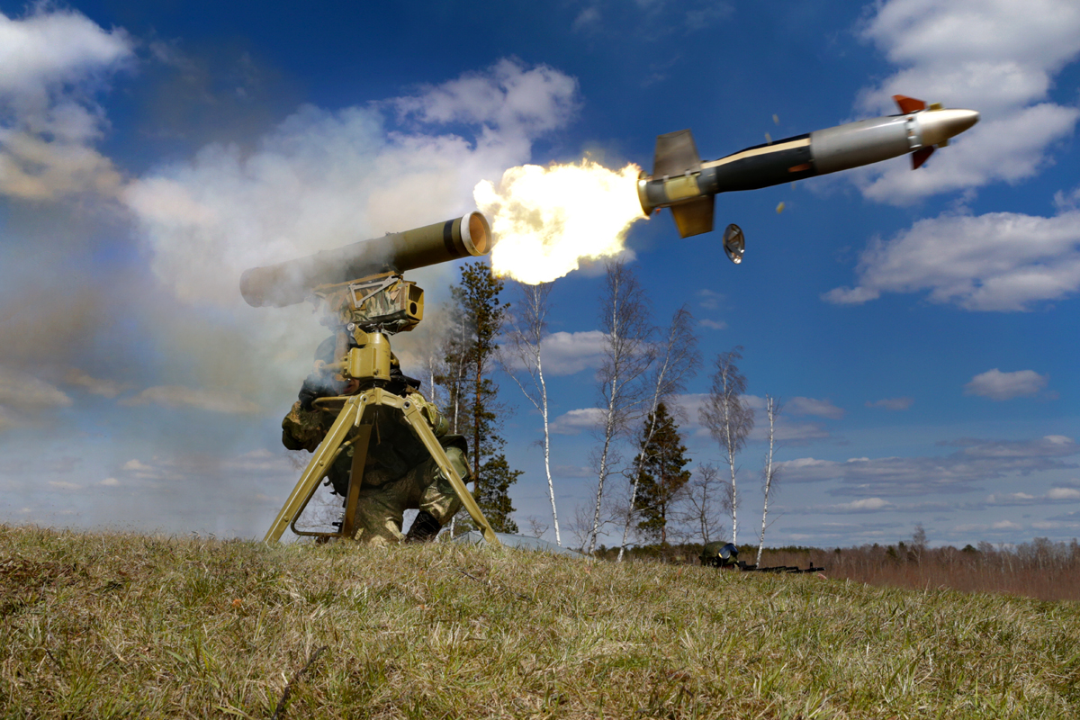 Контрольная проверка курсантов Учебного центра боевого применения ракетных войск и артиллерии Сухопутных войск Западного военного округа (Московская обл.)